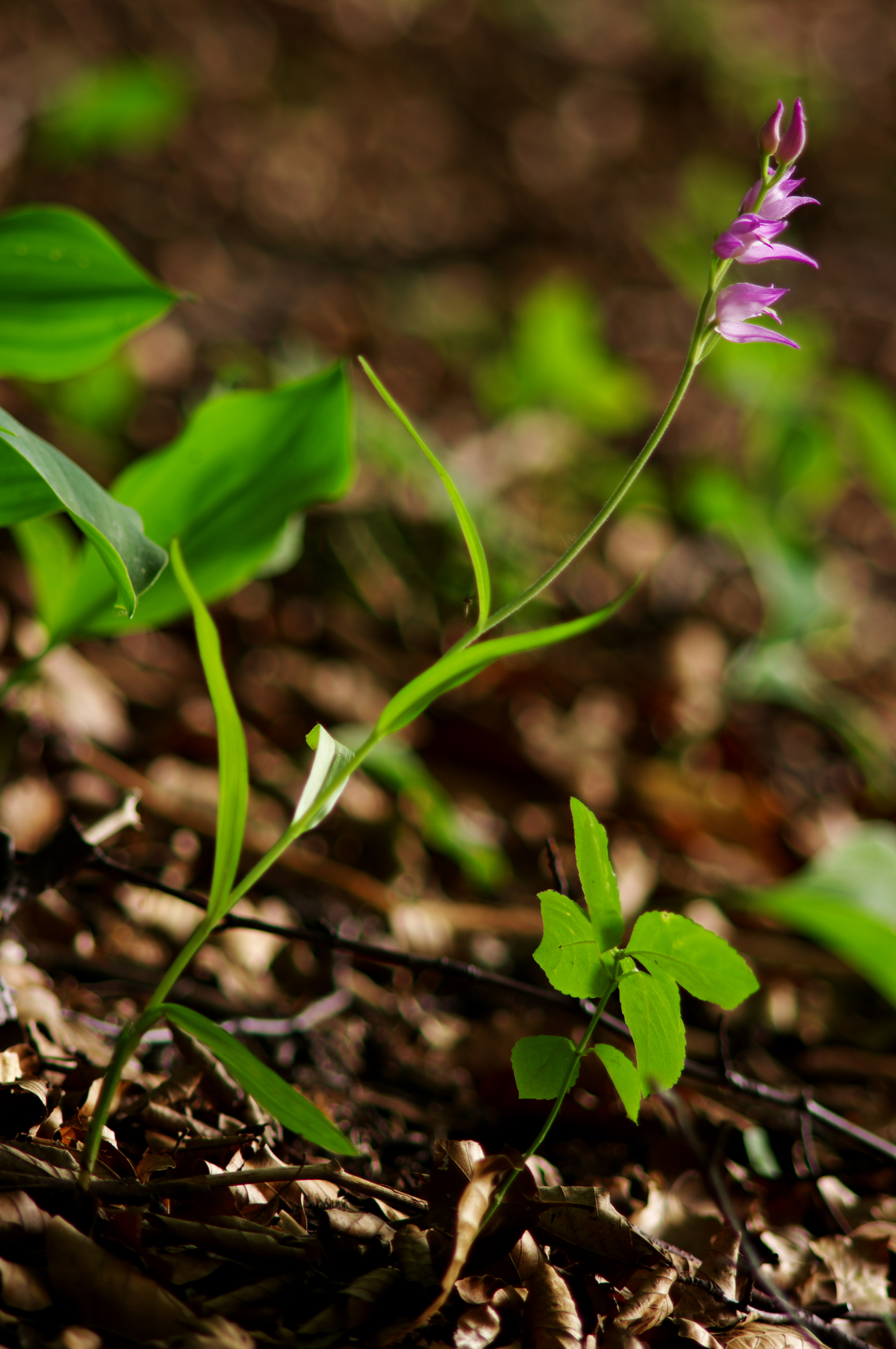 Buławnik czerwony (Cephalanthera rubra) / Bukowa Góra - Dąbrowa Górnicza